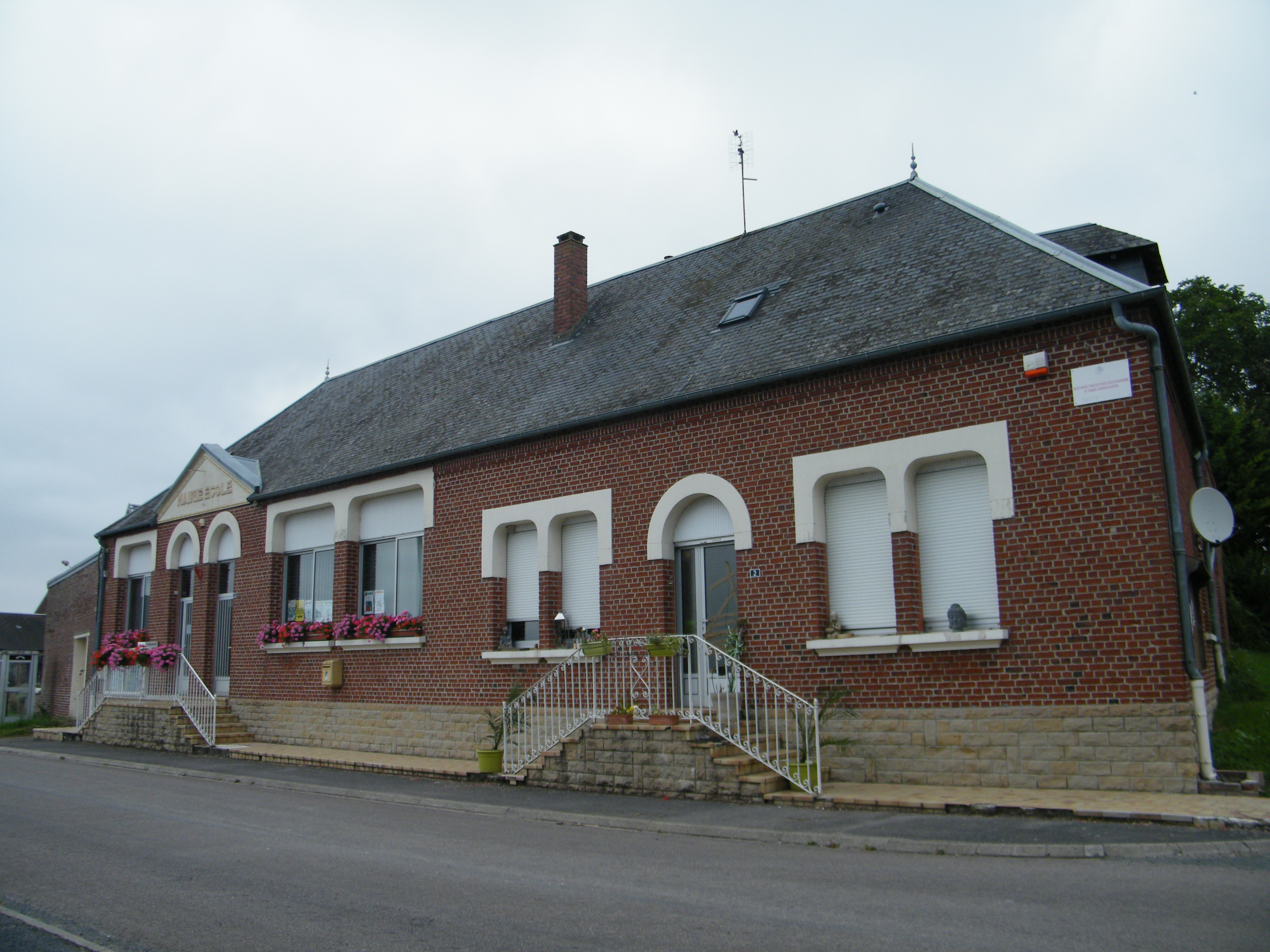 Mairie-école de Curlu (Somme, France).